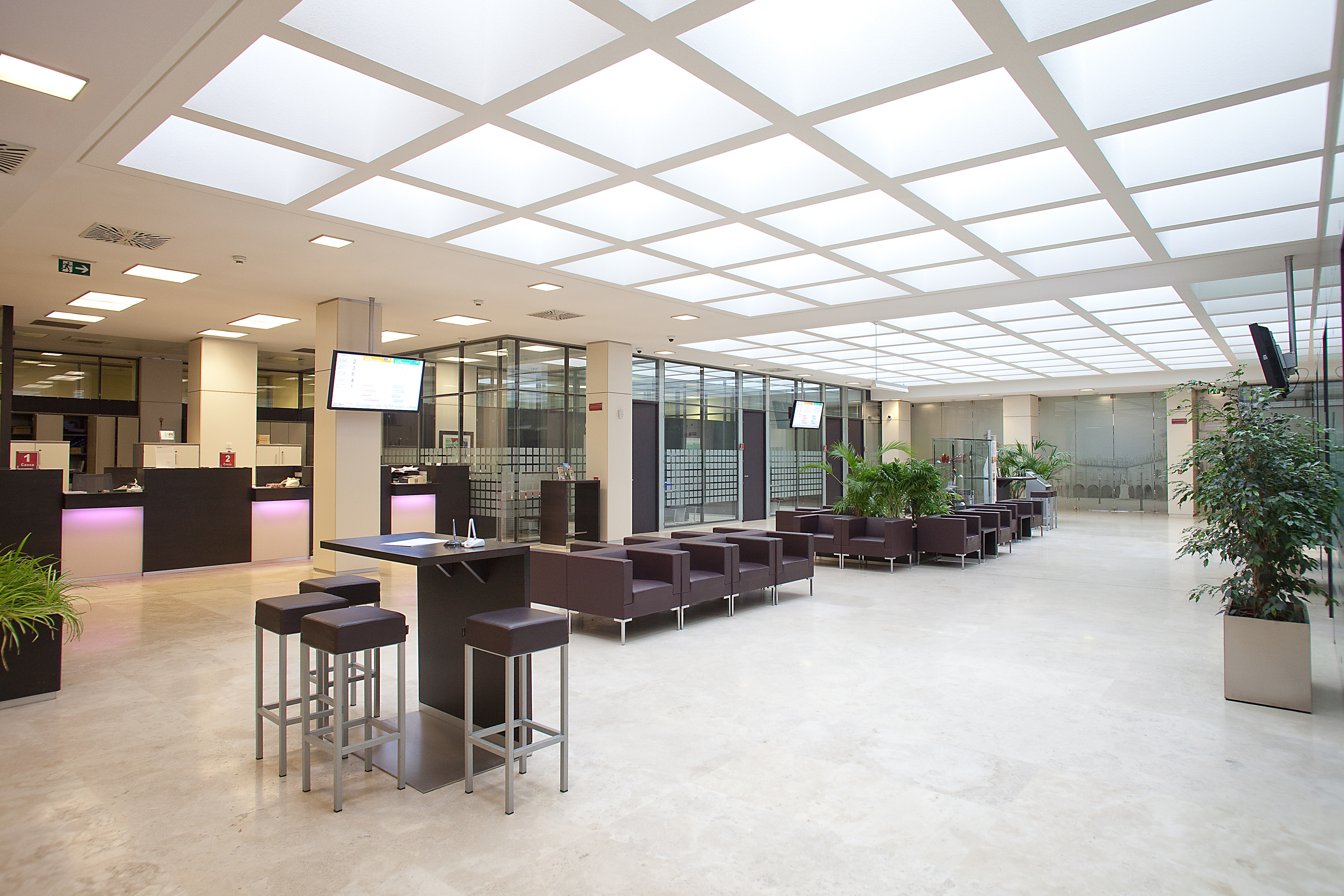 Interno della Filiale Sede di Cento dopo la ristrutturazione del 2009